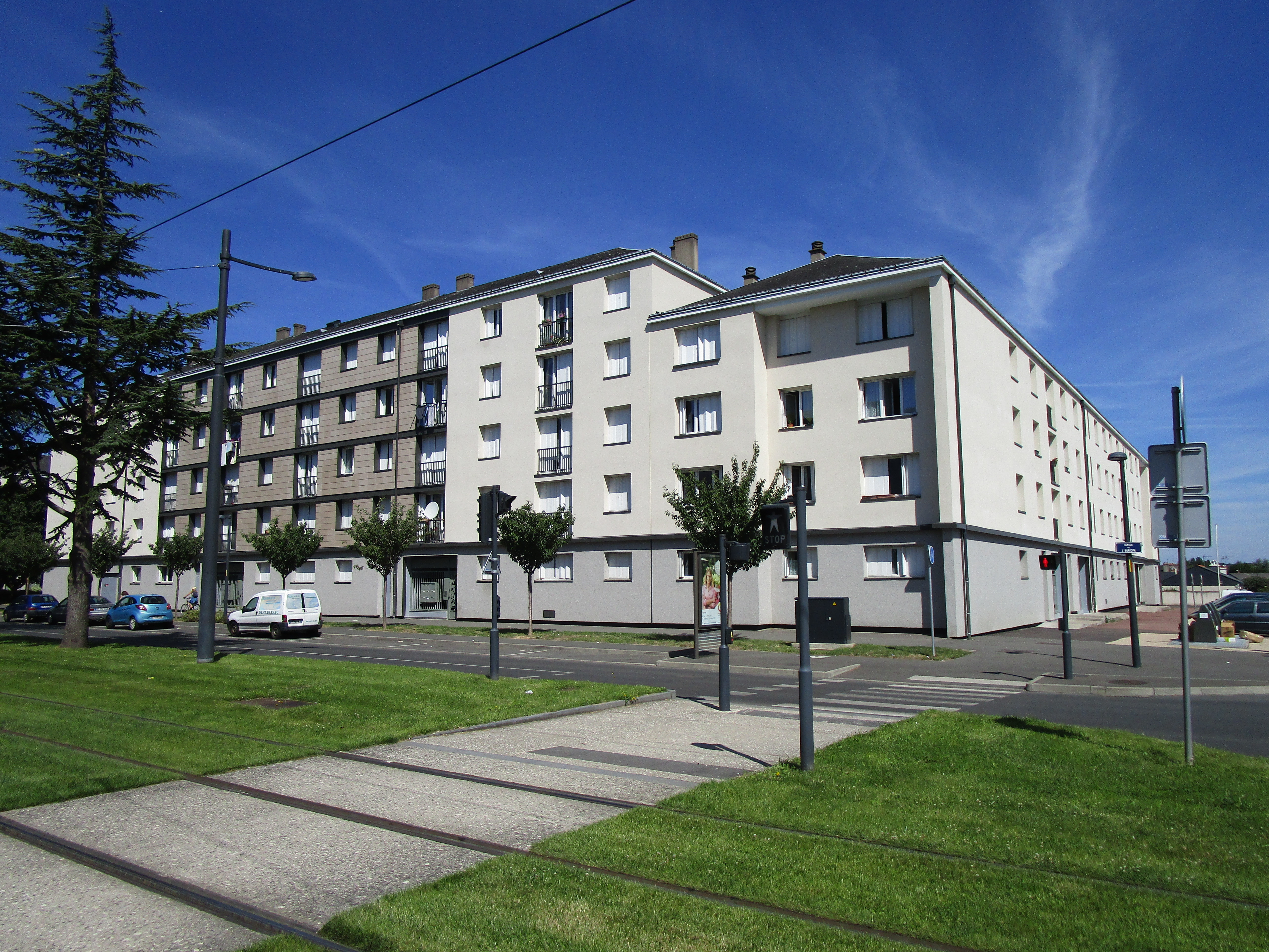 Bâtiment rénové 56 avenue de l'Europe, dans le quartier Beffroi-Europe à Tours Nord.